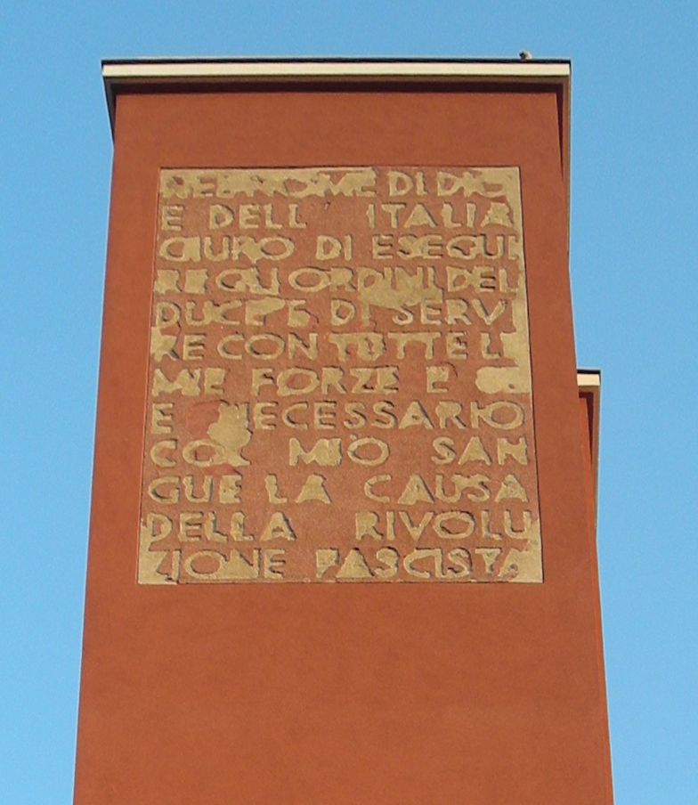 Torre che sovrasta l'ex "Casa della Gioventù Littoria" a Forlì (Italia) che reca la formula del giuramento fascista: "Nel nome di Dio e dell'Italia giuro di eseguire gli ordini del Duce e di servire con tutte le mie forze e se è necessario col mio sangue la causa della rivoluzione fascista"